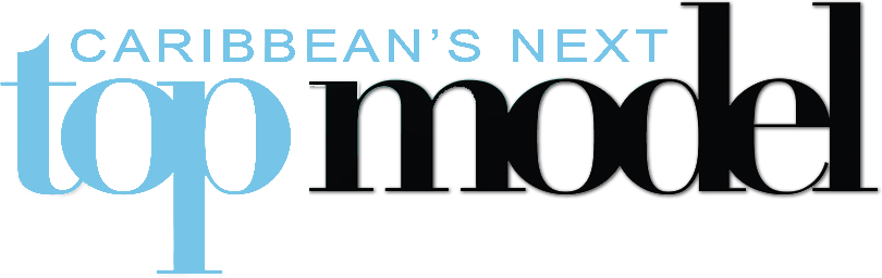 Logo de Caribbean's Next Top Model